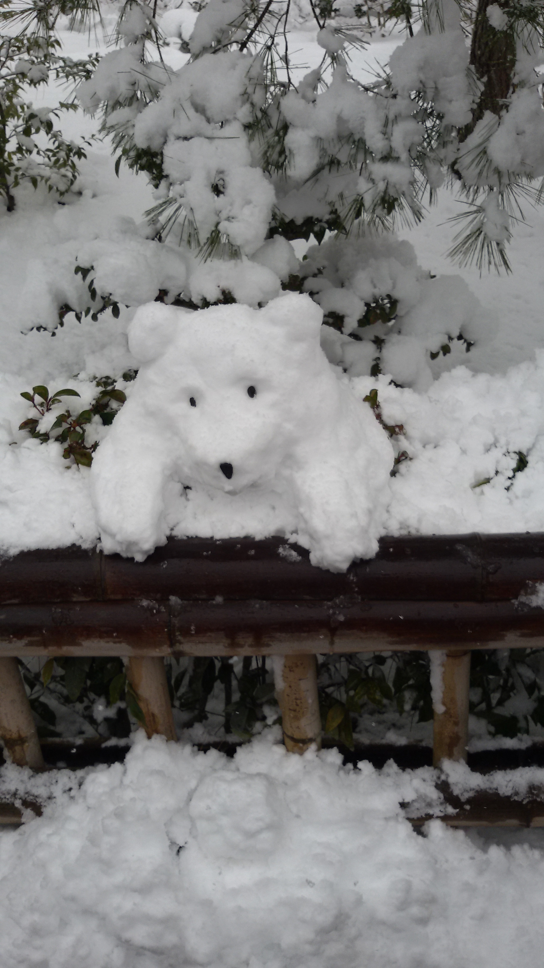 京都 雪熊